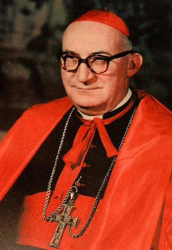 Chorvatsky kardinal Franjo Šeper (1905-1981)